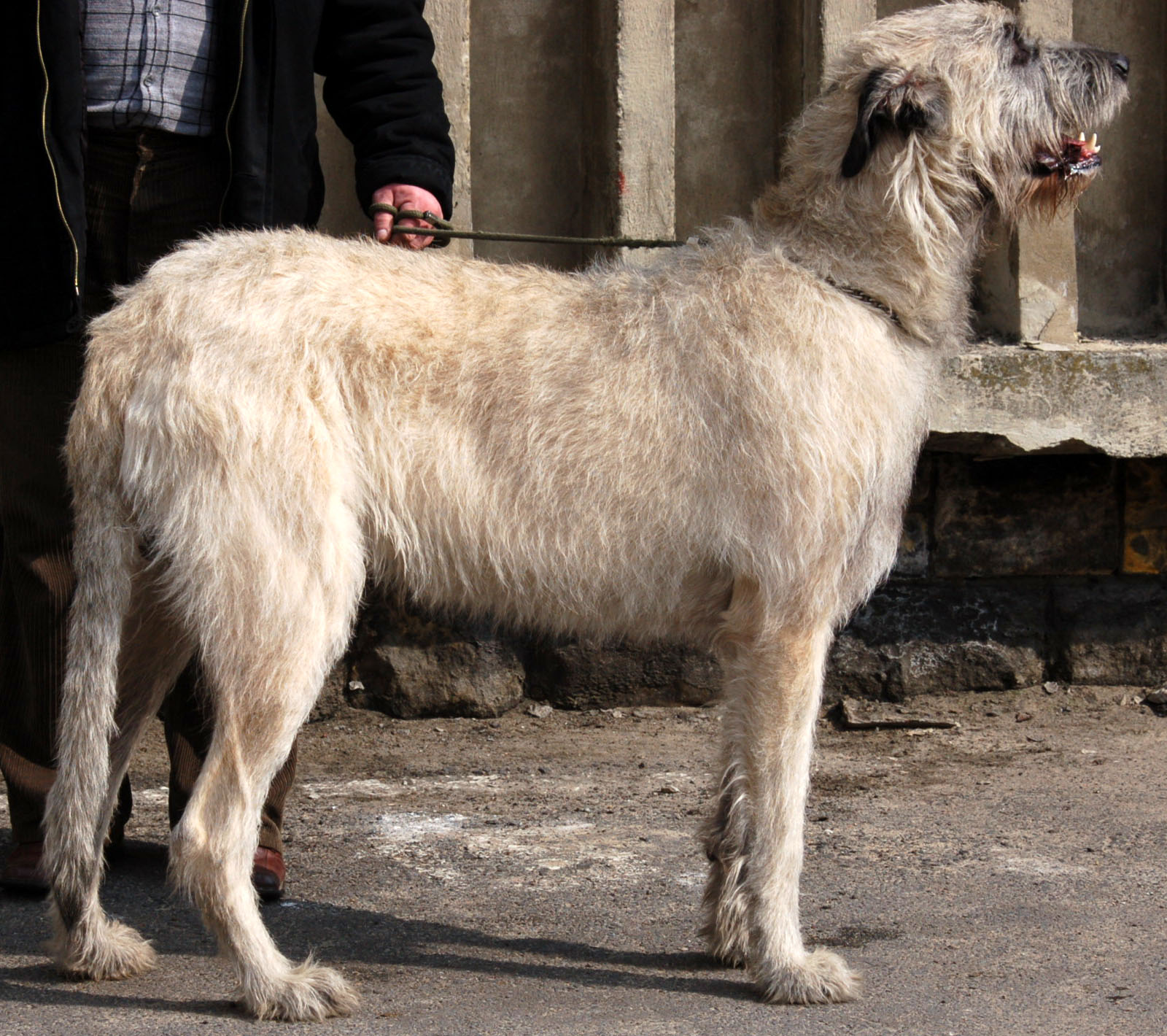 Wilczarz_irlandzki